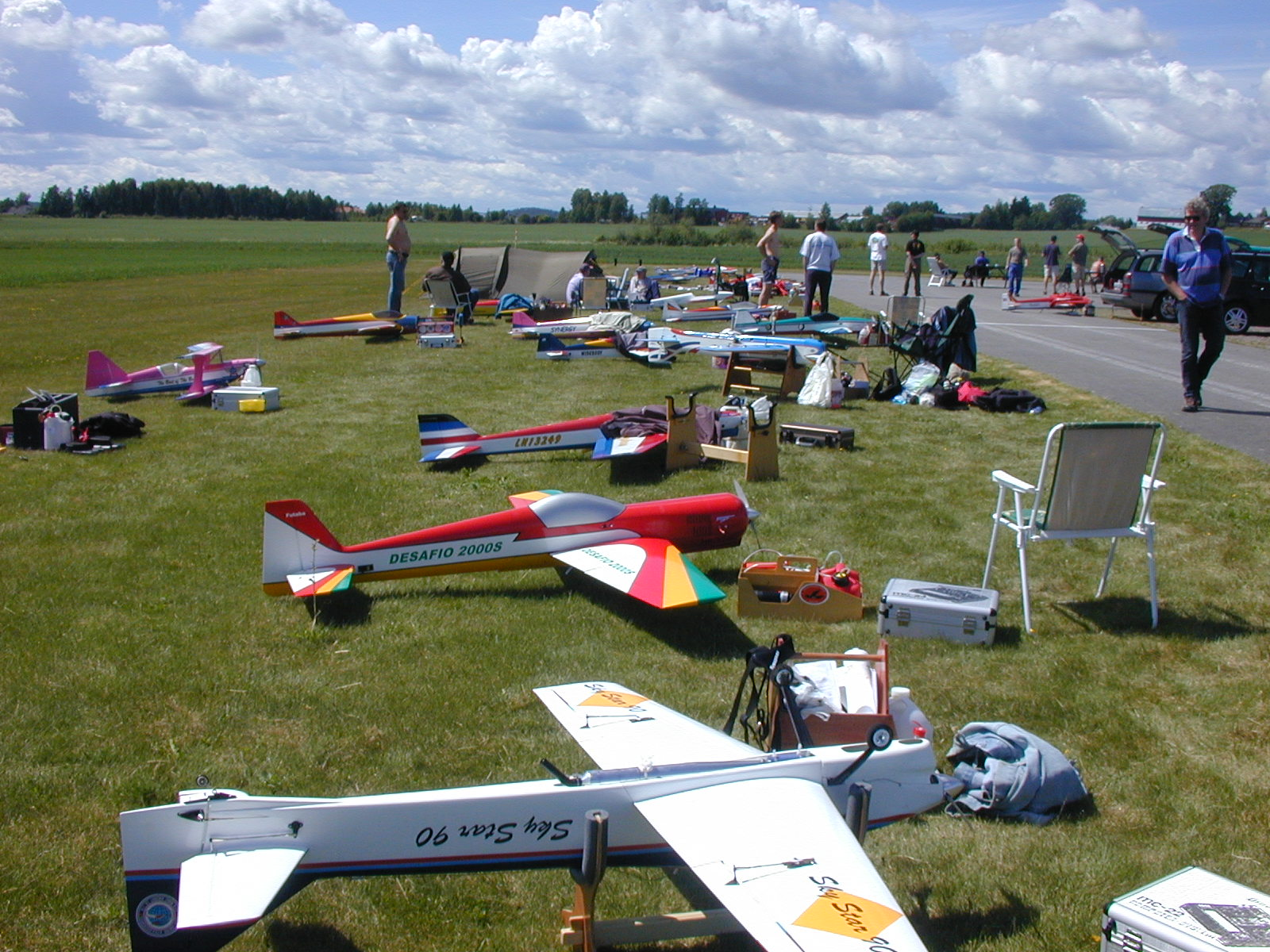 Model aircraft at Tønsberg Airport, Jarlsberg